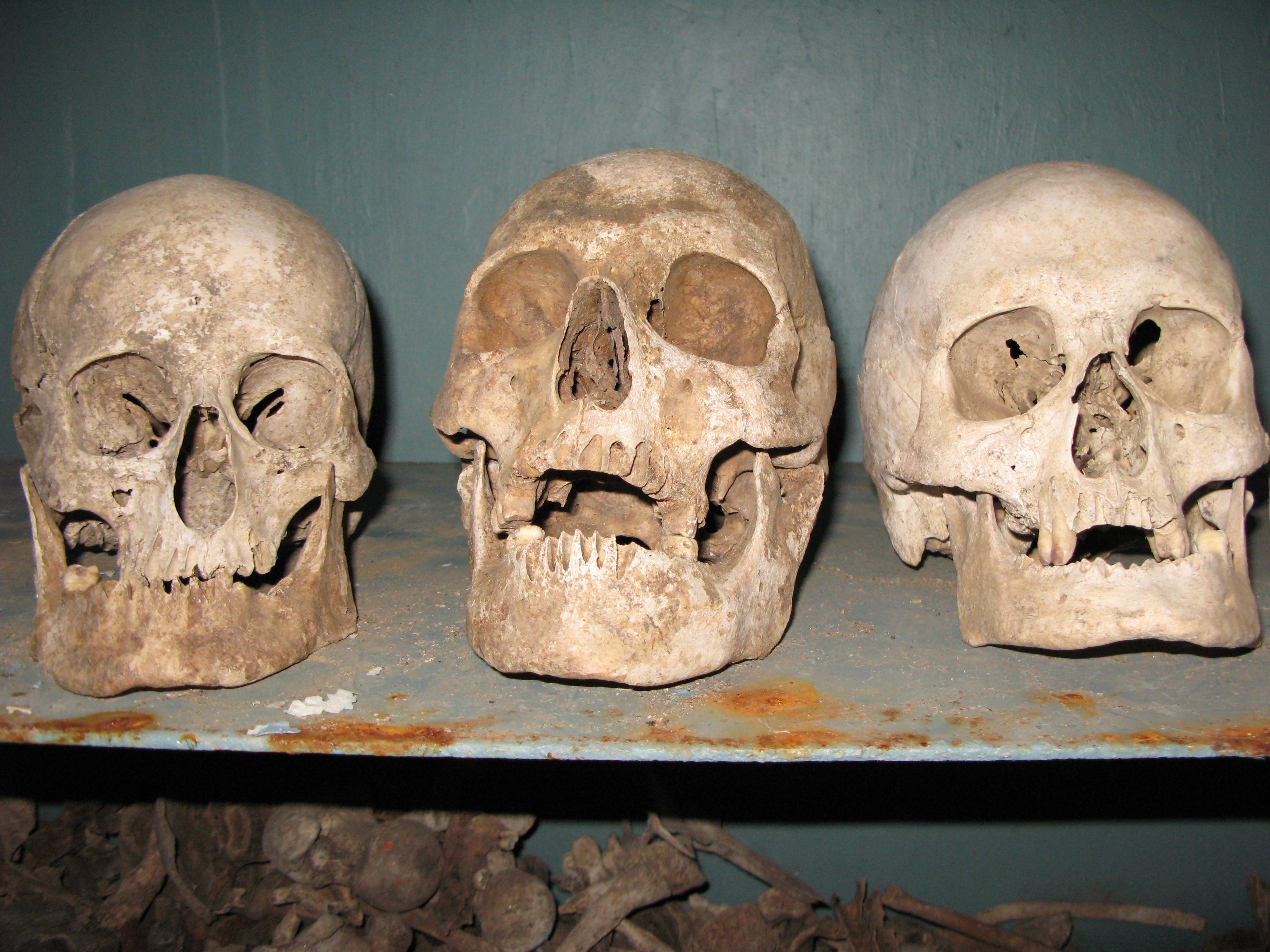 Костурница.